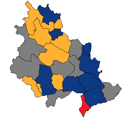 !Template:Llegenda}